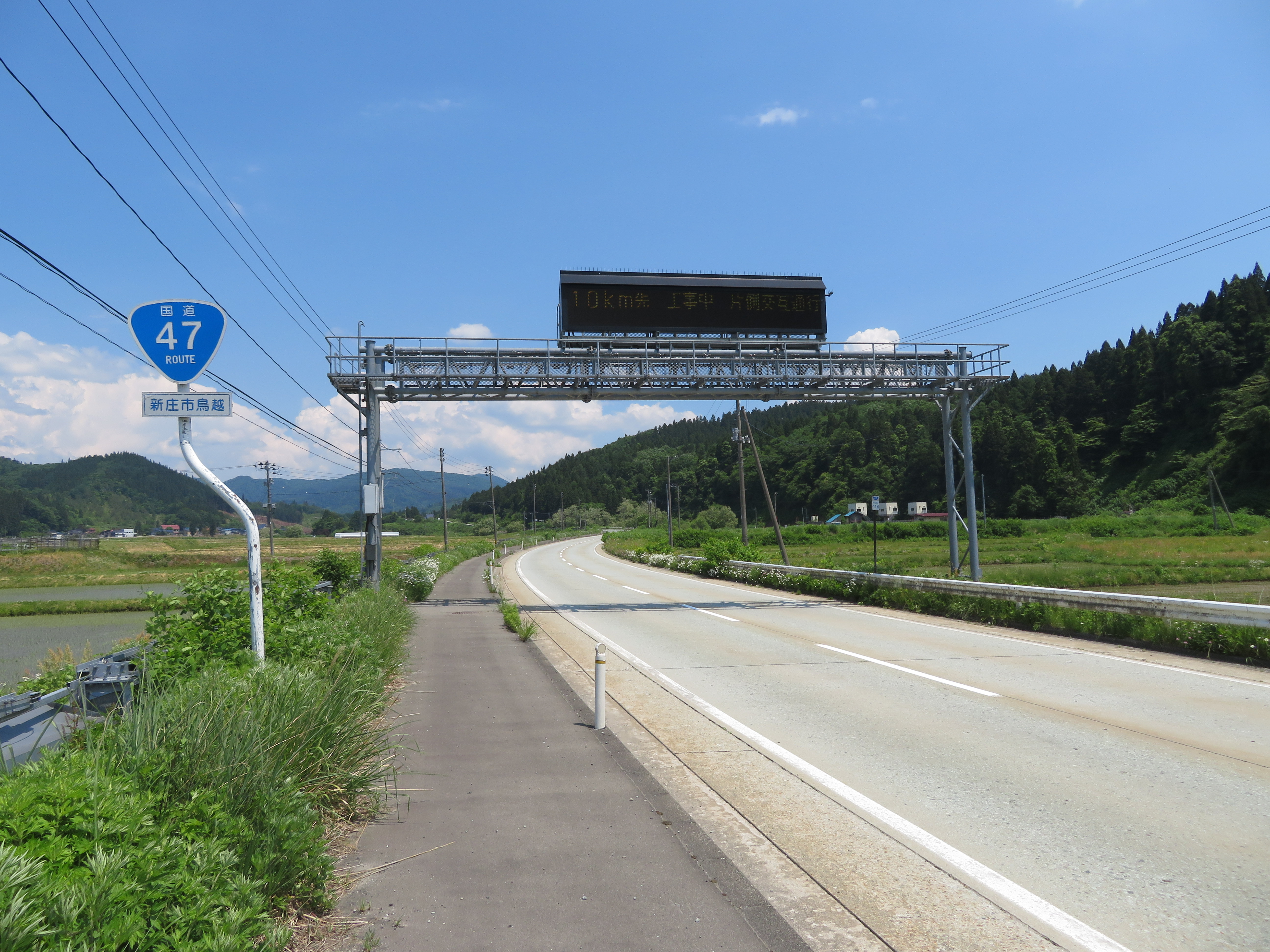 国道47号線亀割バイパス 山形県新庄市鳥越付近（最上方面を撮影） Canon PowerShot SX720 HS